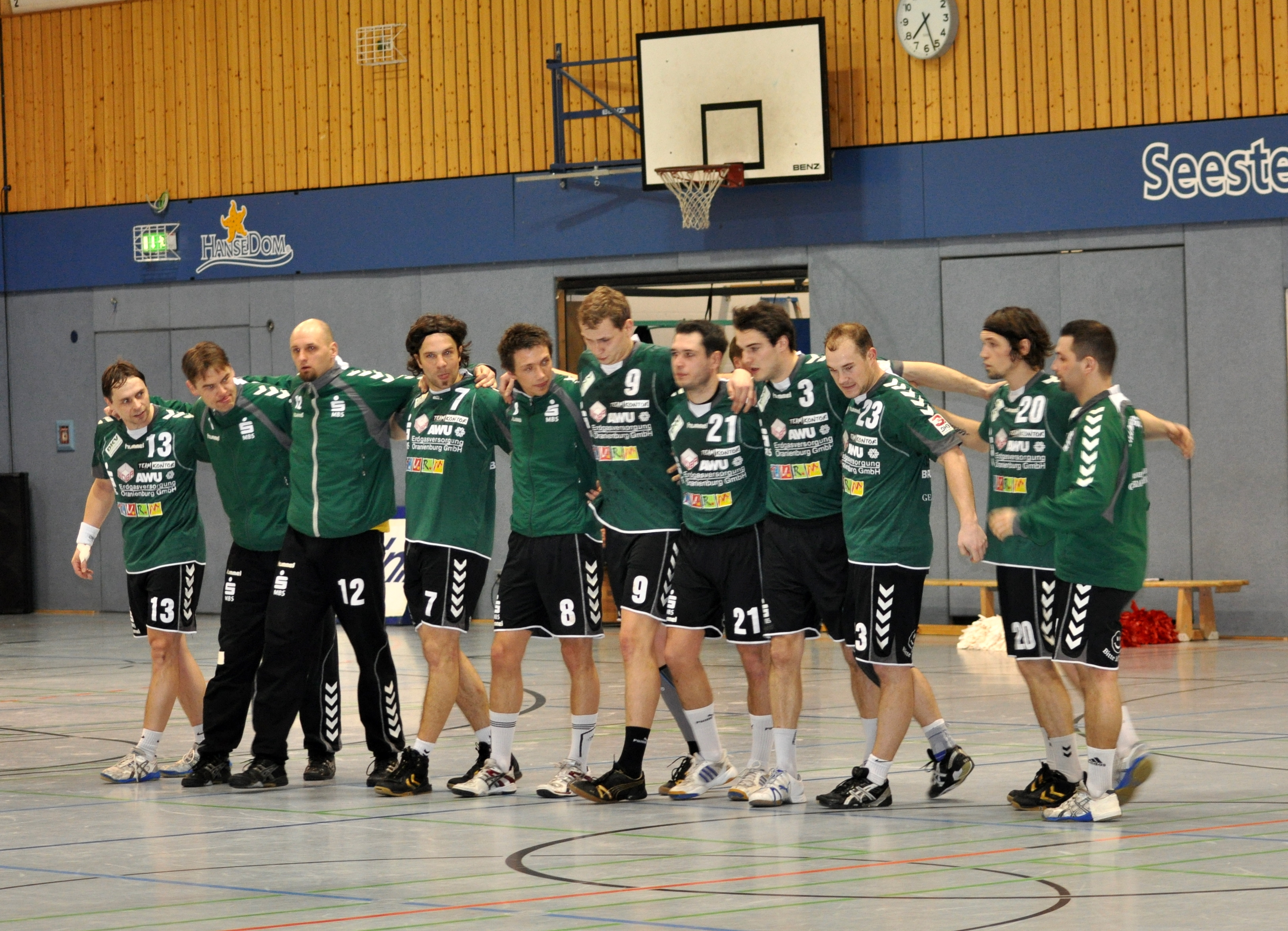 Bilder vom Punktspiel des Stralsunder HV in der de:3. Liga (Handball) am 12. Februar 2011 in der Vogelsanghalle Stralsund gegen den Oranienburger HC (35:34). Die erste Männer-Mannschaft des Oranienburger HC am 12.2.2011 in der Vogelsanghalle in Stralsund vor dem Punktspiel beim Stralsunder HV. Der Stralsunder HV gewann das Spiel in der 3. Liga mit 35:34.